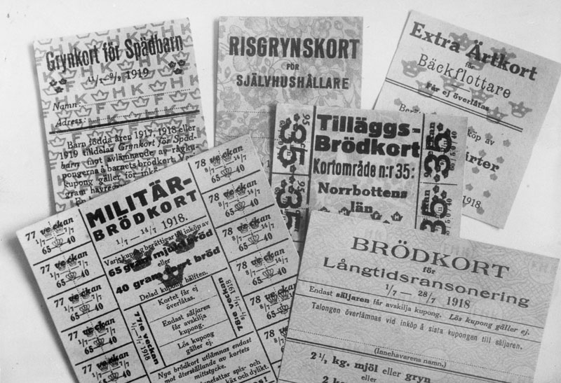 Stockholms stadsmuseum F 85090